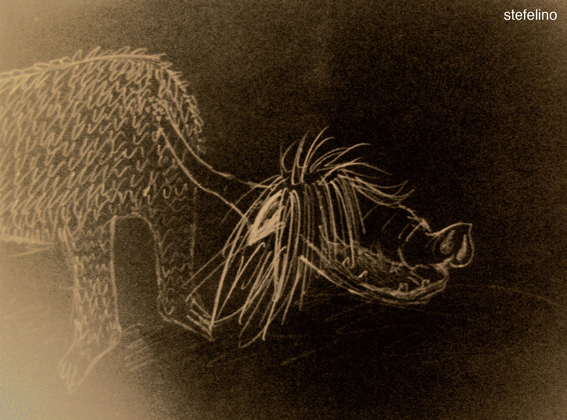 Katoblepas